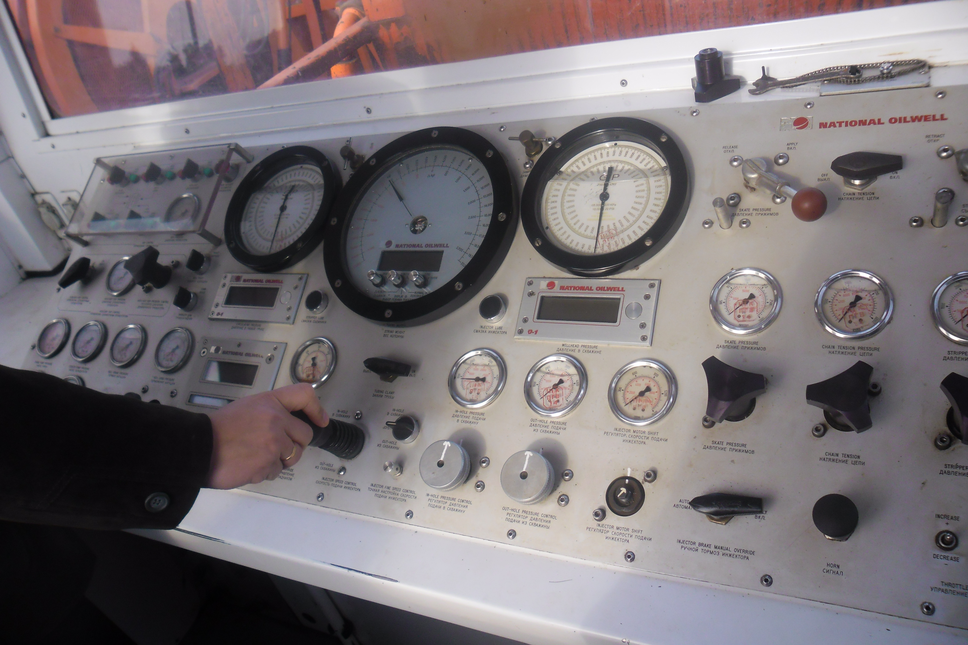 Фото